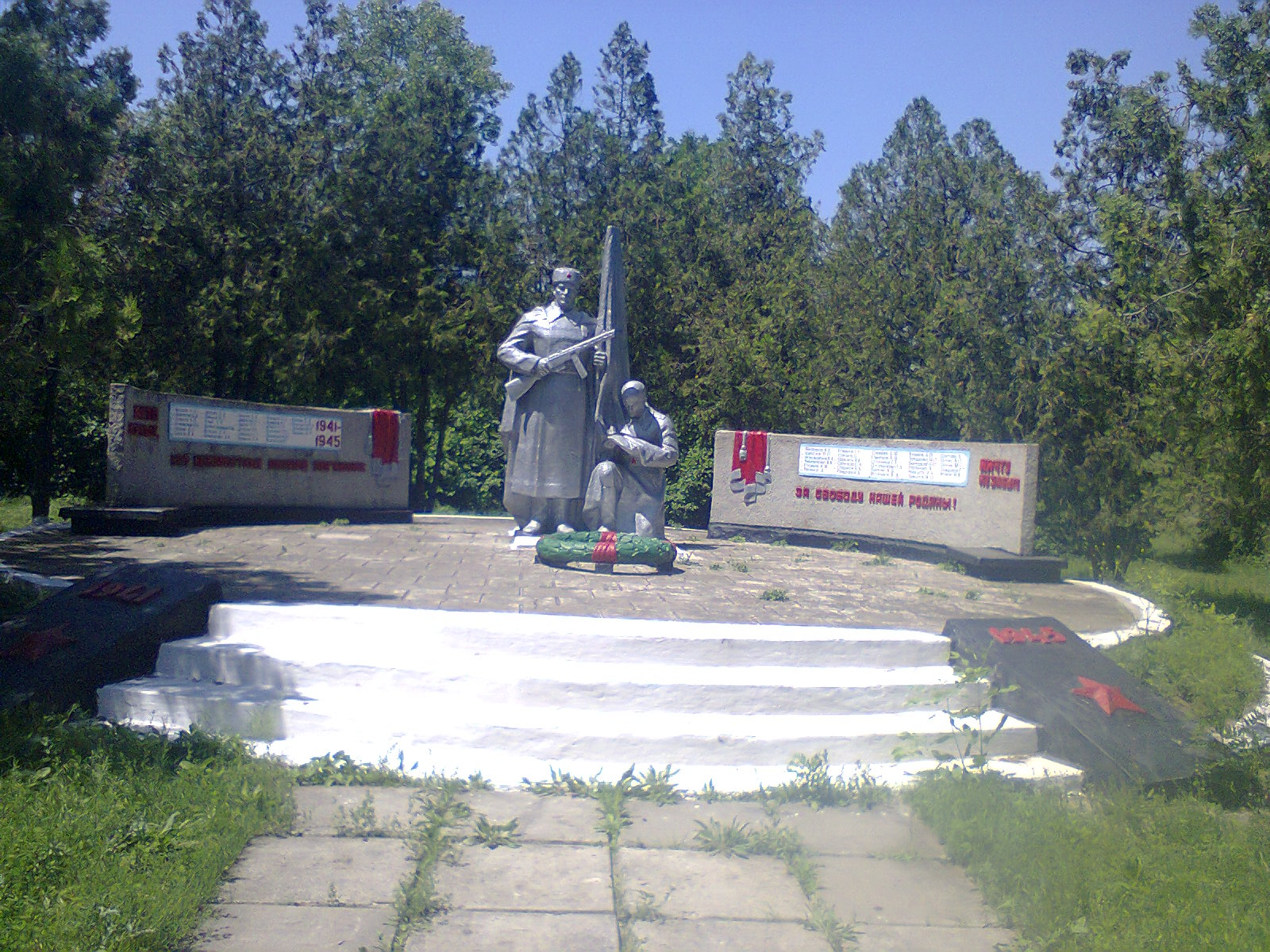 Меморіал воїнам визволителям радянської армії у селі Медичне на території паркової зони.